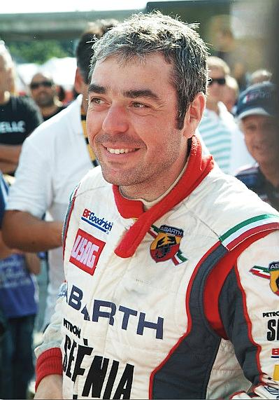 Luca Rossetti RD Pilota professionista